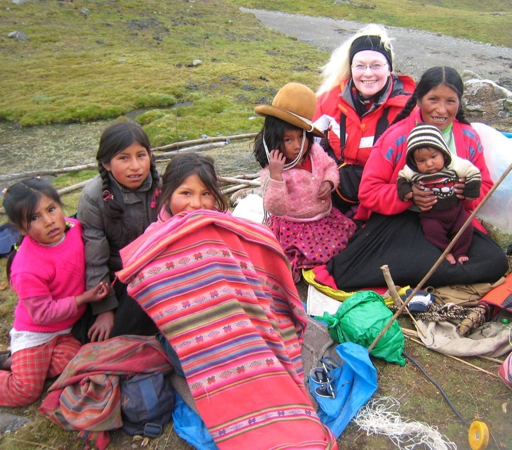 Kerstin Störl, Feldforschung (2015)